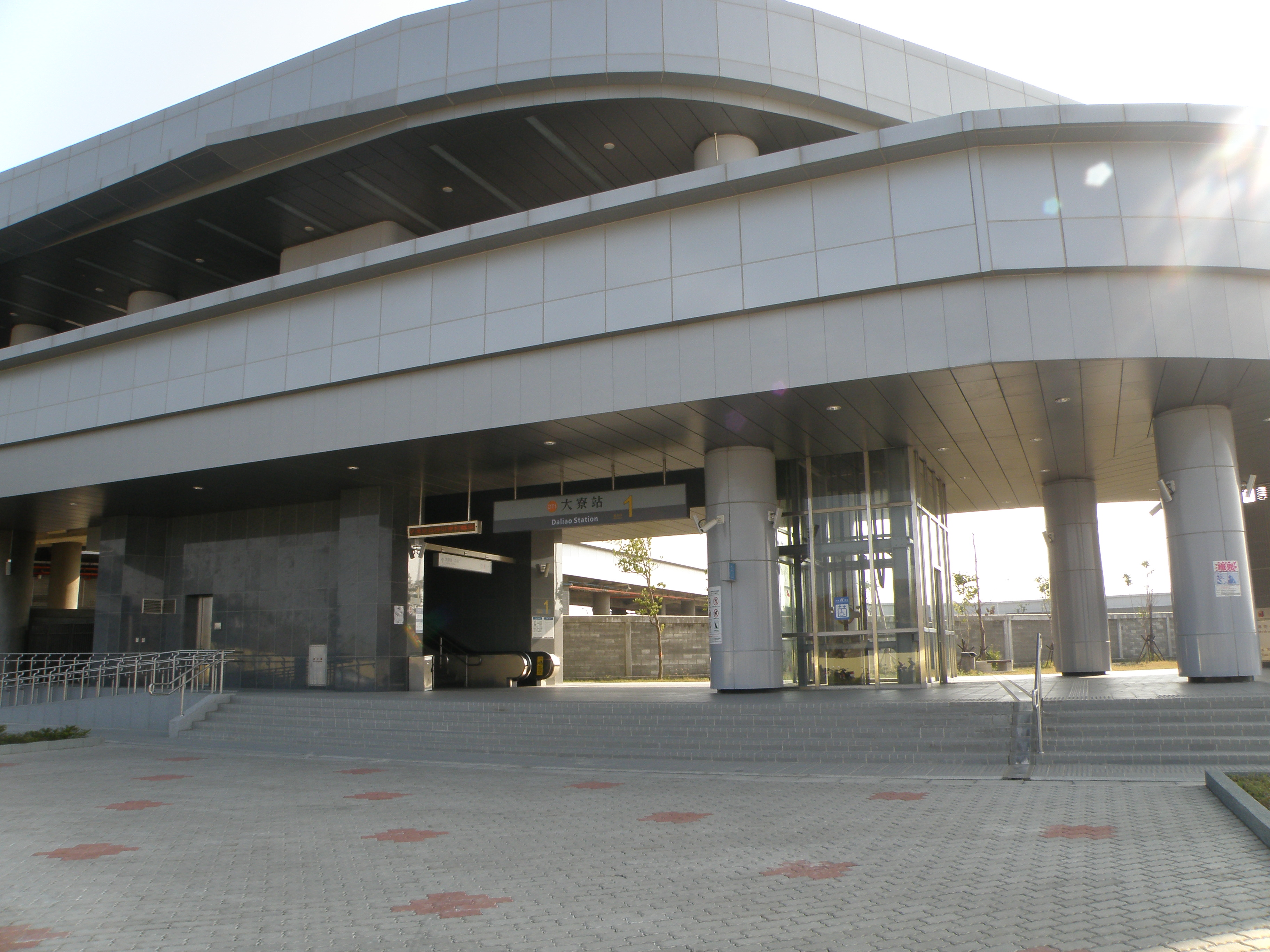 高雄捷運大寮站1號出口。